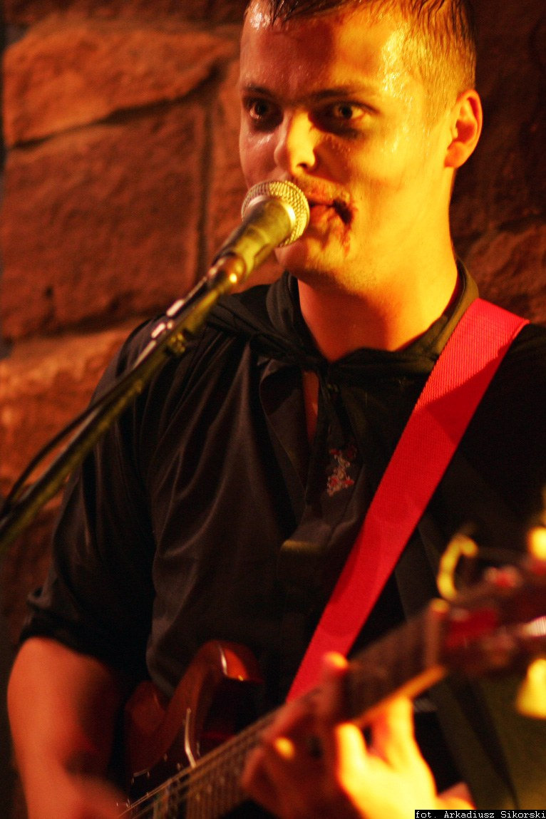 Kawałek Kulki in Klub Magnat in Gorzów Wielkopolski.